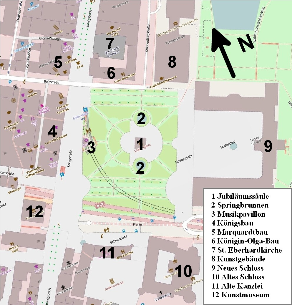 Schloßplatz in Stuttgart. 1 Jubiläumssäule 2 Springbrunnen 3 Musikpavillon 4 Könihsbau 5 Marquardtbau 6 Königin-Olga-Bau 7 St. Eberhardkirche 8 Kunstgebäude 9 Neues Schloss 10 Altes Schloss 11 Alte Kanzlei 12 Kunstmuseum